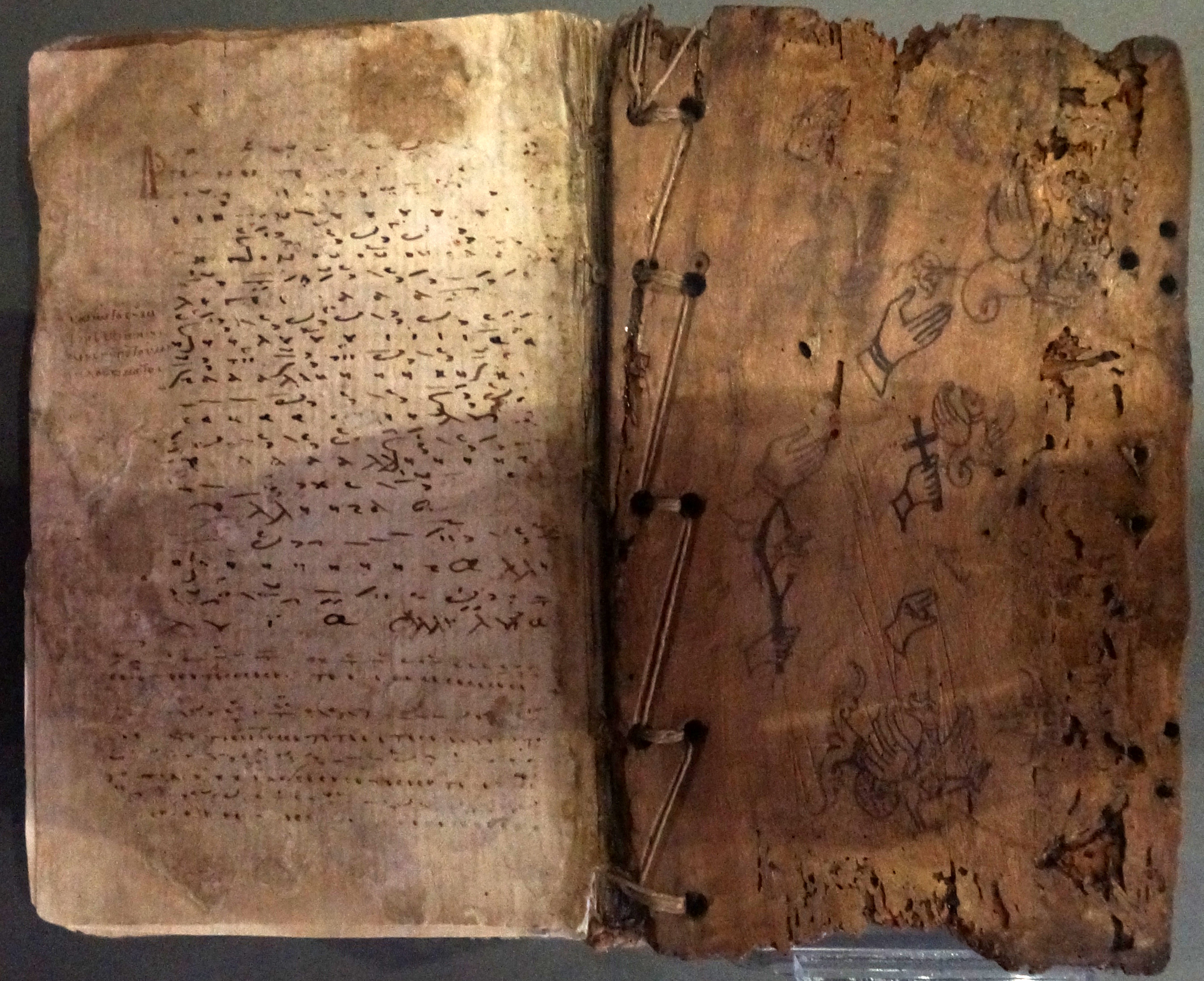 collection du Museum of Byzantine Culture.